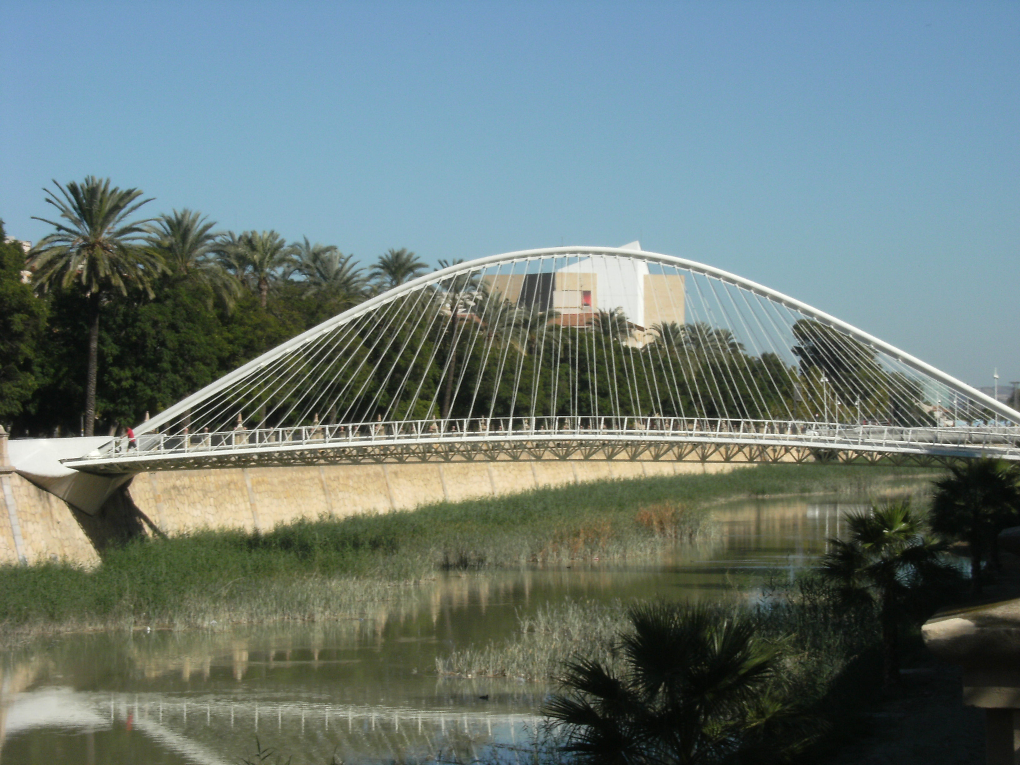 Pasarela peatonal Jorge Manrique sobre el río Segura, Murcia. Diseñada por Santiago Calatrava.